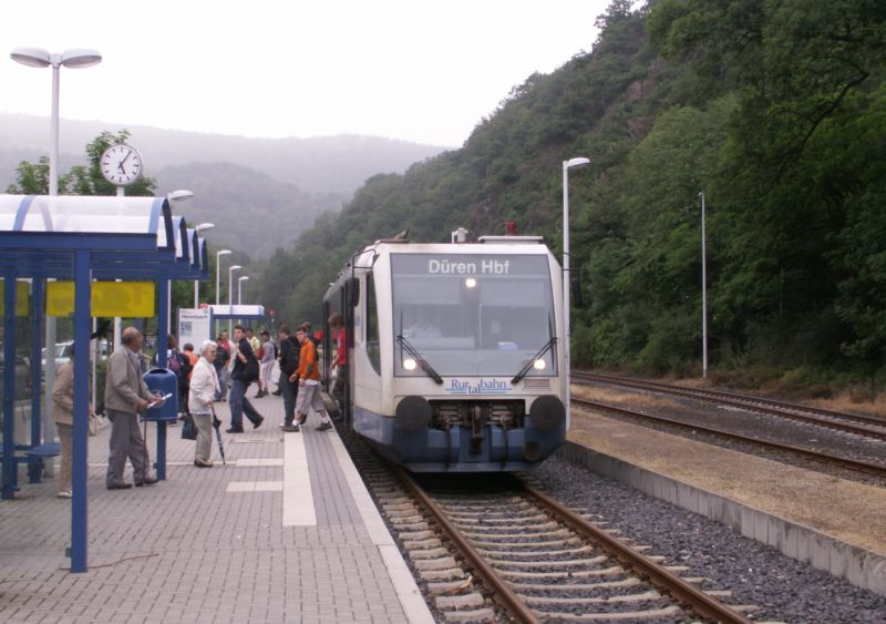 RegioSprinter der Rurtalbahn im Bahnhof Heimbach an der Bahnstrecke Düren-Heimbach